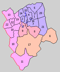 和歌山権威と郡の町村制時点の町村。